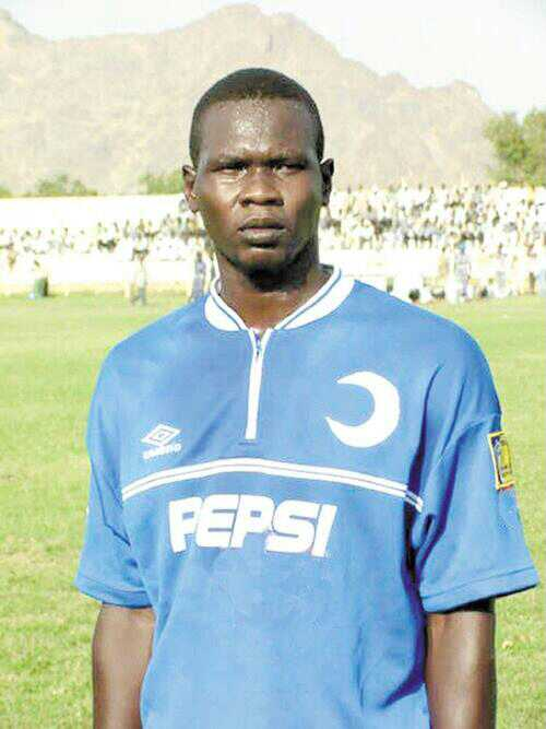 Motaz Kabier Kassala Stadium